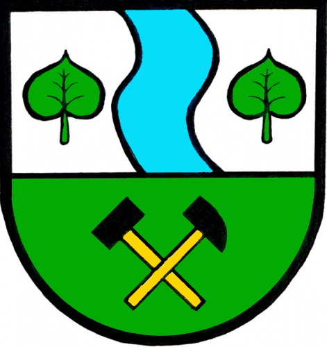 Vejvanov, znak. Ve stříbrno-zeleně děleném štítě nahoře modrý vlnitý kůl provázený dvěma vztyčenými zelenými lipovými listy, dole kosmý mlátek, šikmo přeložený želízkem, obojí černé na zlatých topůrkách.